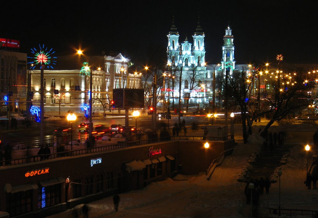 Беларуская (тарашкевіца): Віцебск